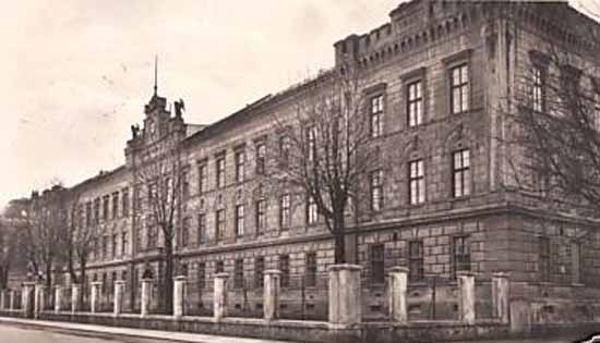 Rainerkaserne in St Pölten